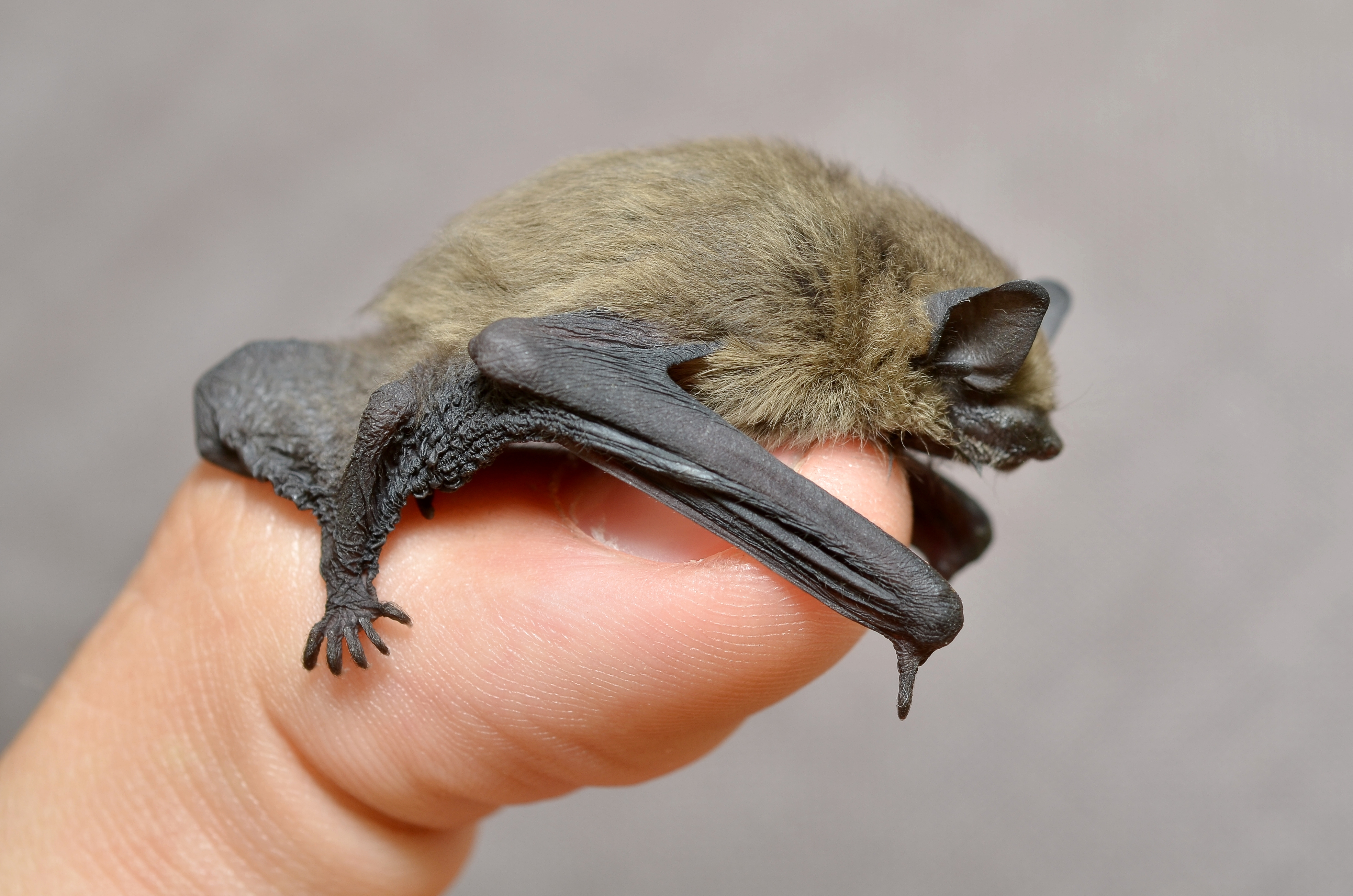 Pipistrellus pipistrellus bat on a thumb